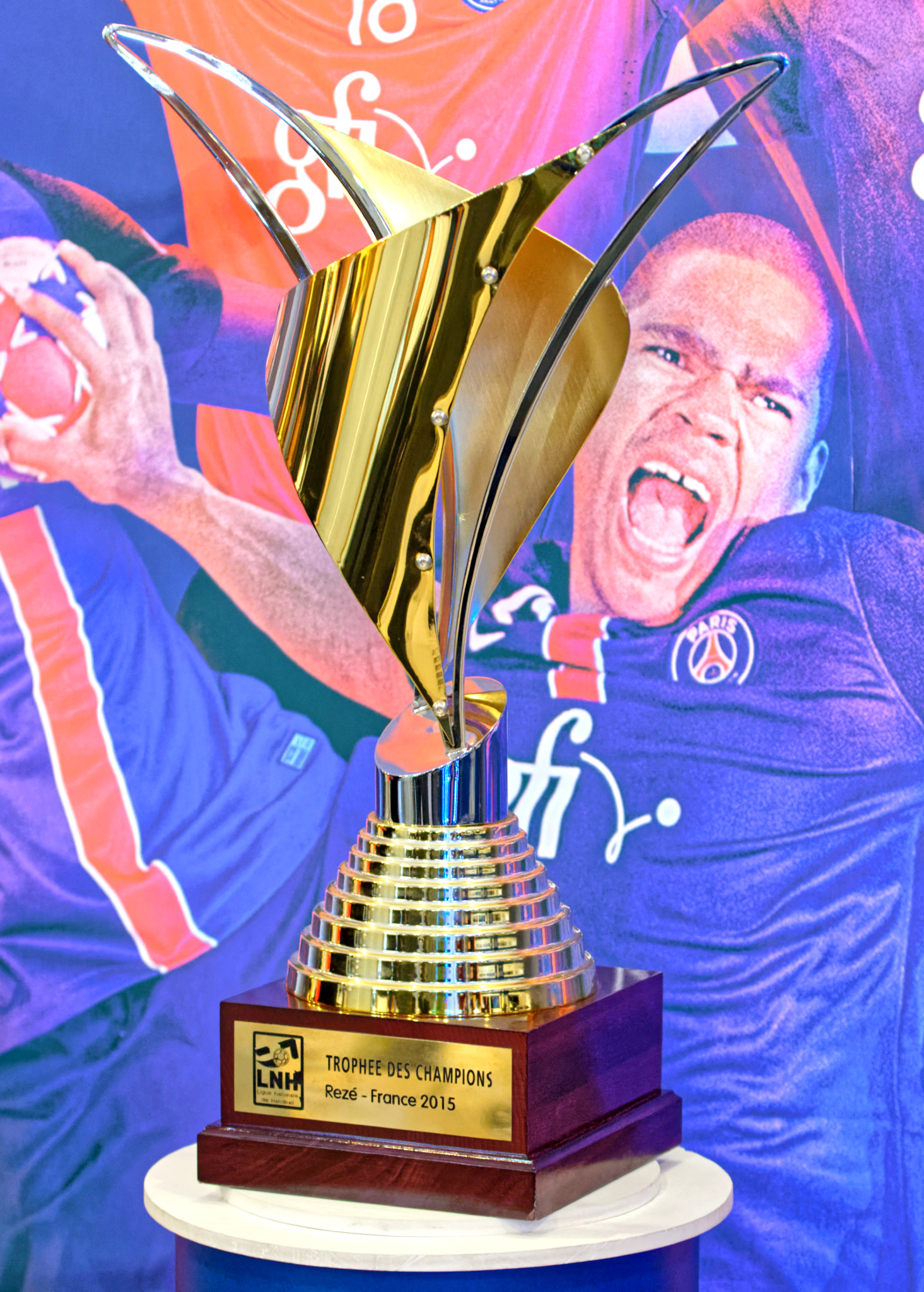 Trophée des champions 2015 présenté par le PSG lors de la rencontre de championnat entre le PSG et Nîmes. A Coubertin, le 10 septembre 2015.